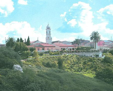 Panorama di Tissi